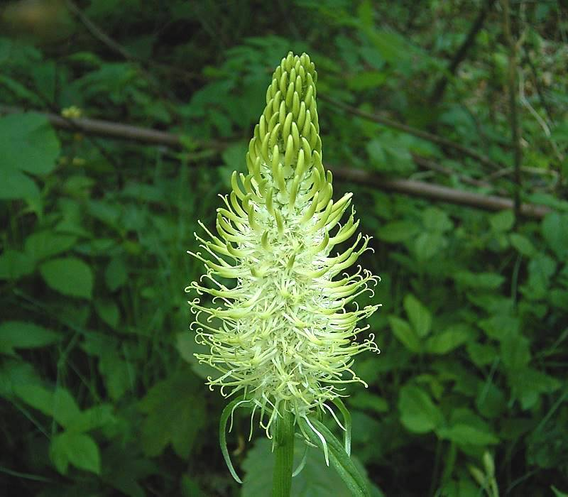 Phyteuma spicatum